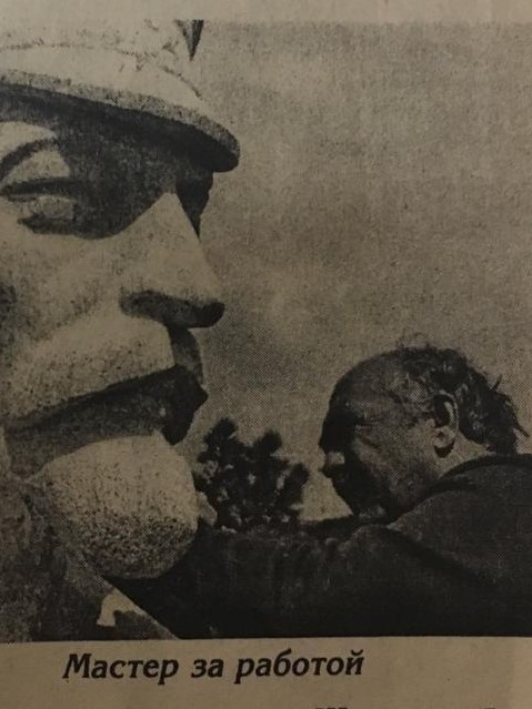 Ахмет Цаликов лепит Дзержинского: опыбликовано в статье к 75-летию скульптора в Независимой газете